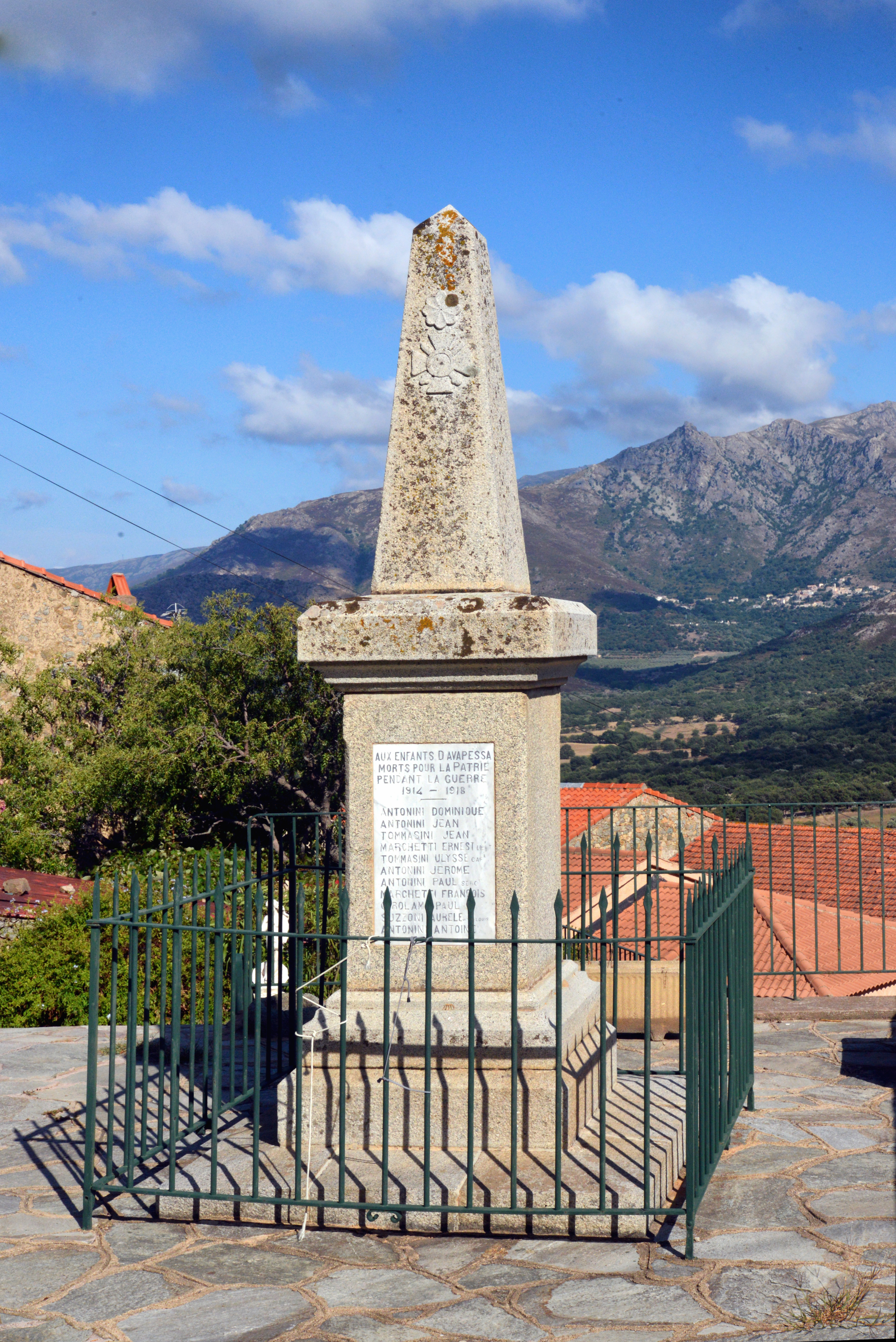 Avapessa, Balagne (Corse) - Monument aux morts au cœur du village